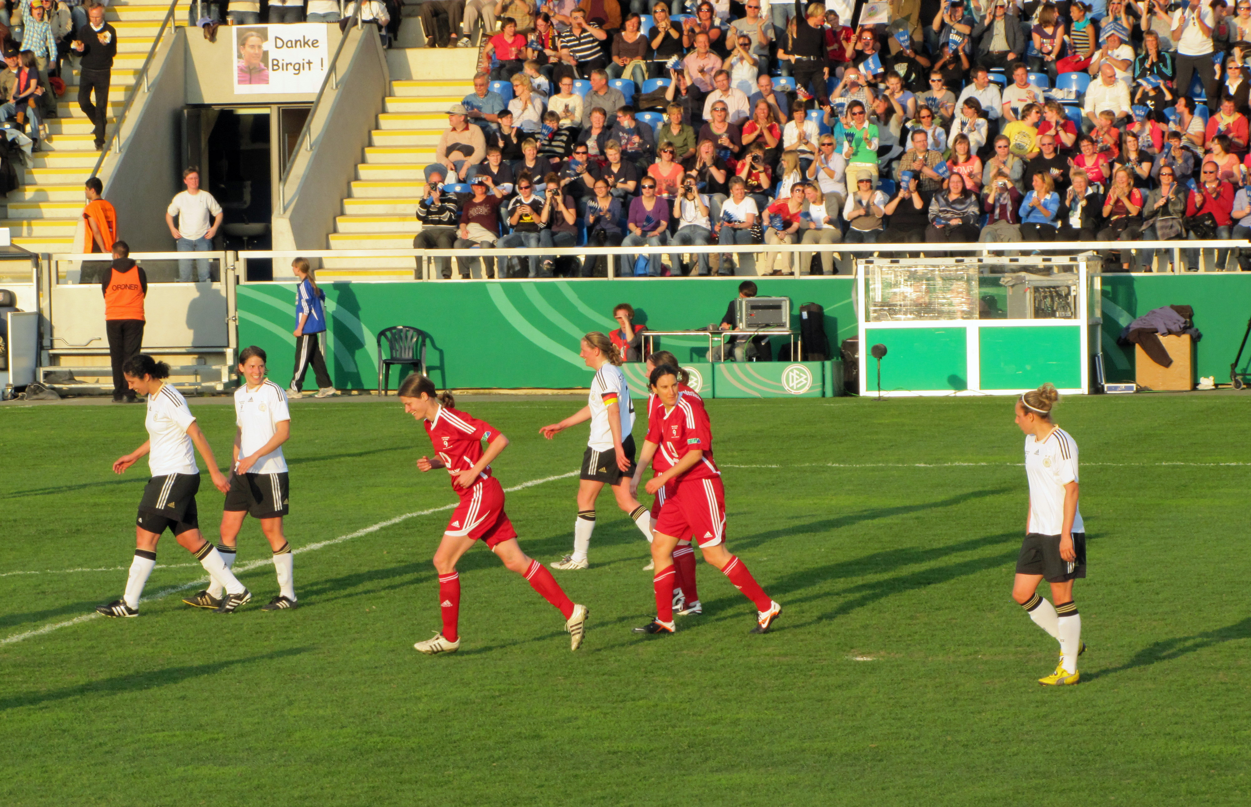 DFB-Abschiedsspiel für Birgit Prinz im Volksbank-Stadion in Ffm. Szene aus der 1. Halbzeit mit Birgit Prinz. Nach ihrem Tor auf dem Weg zum Anstoßkreis